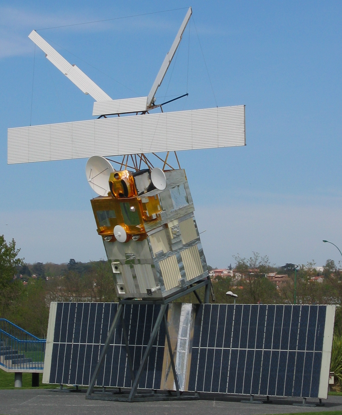 ERS 2 mock-up (real size) from Cité de l'Espace in Toulouse